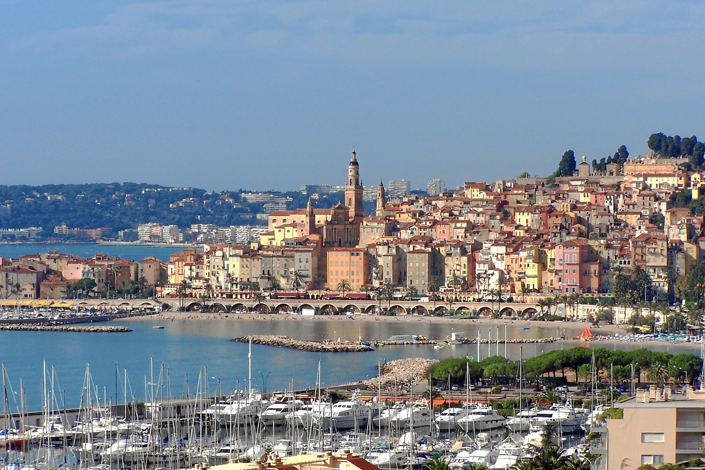 Menton vom Boulevard de Garavan aus betrachtet